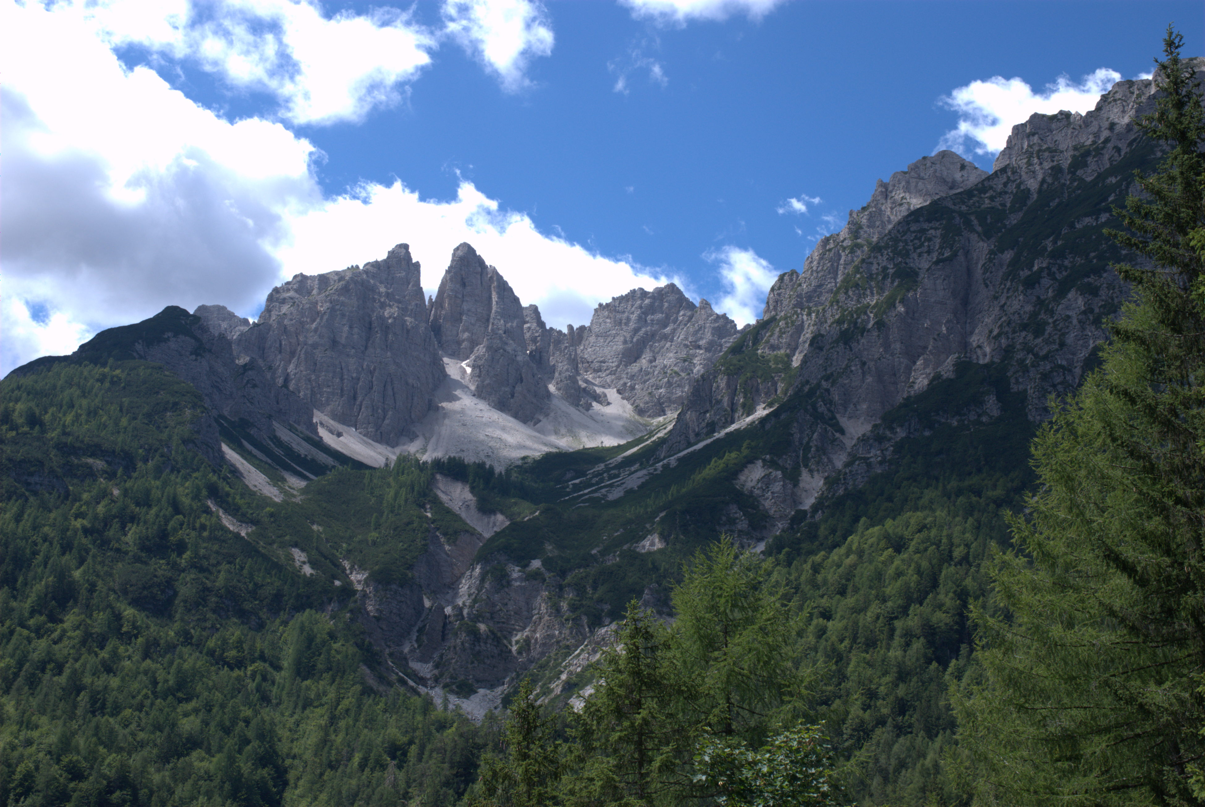 Lorenzago di Cadore - Val della Tora.jpeg